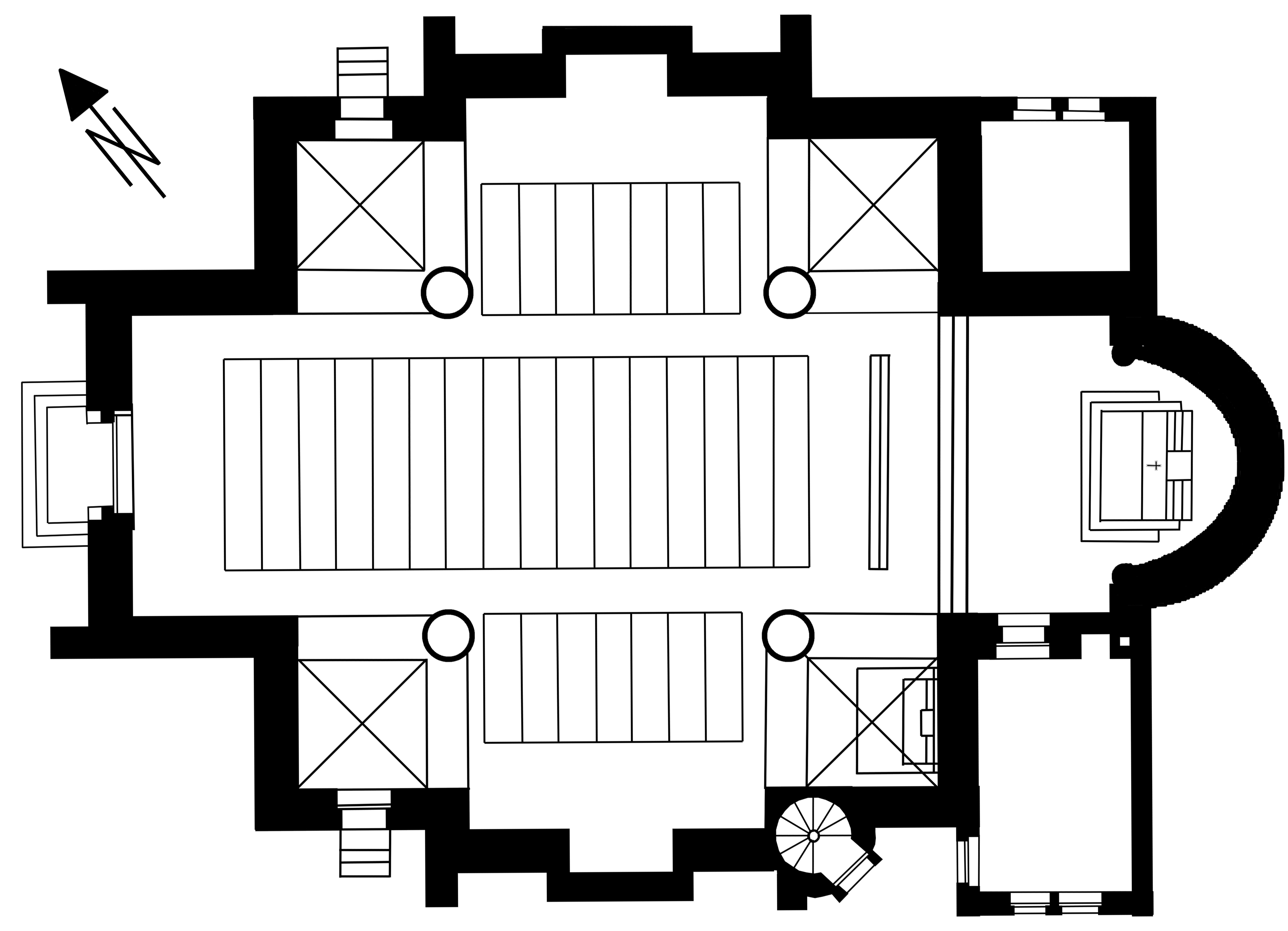 Mariä Heimsuchung - Hauenhorst. Grundriss nach dem Plan von Franz Klomp.